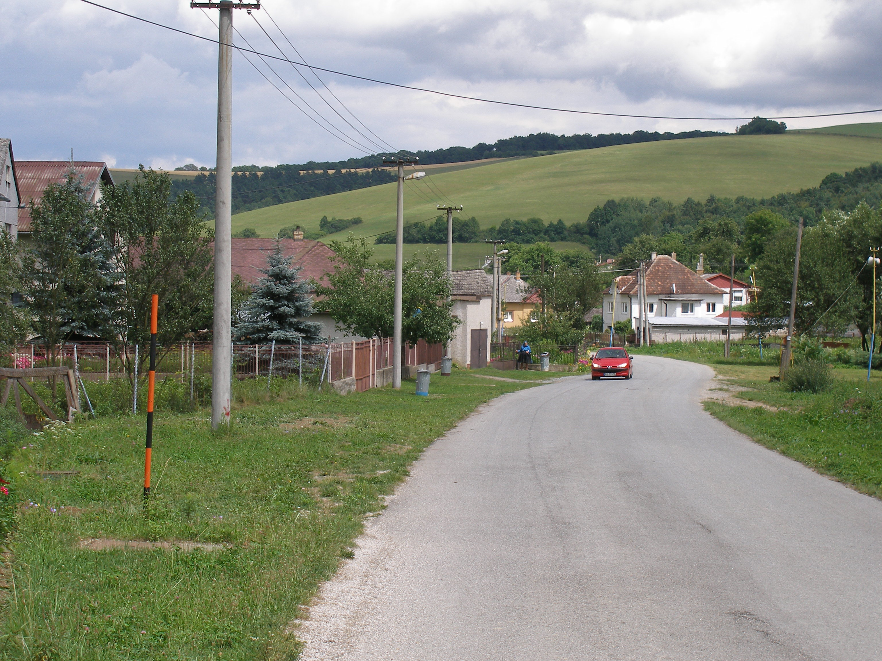 Bajerov obec v Šarišskej vrchovine, okr.Prešov, región Šariš